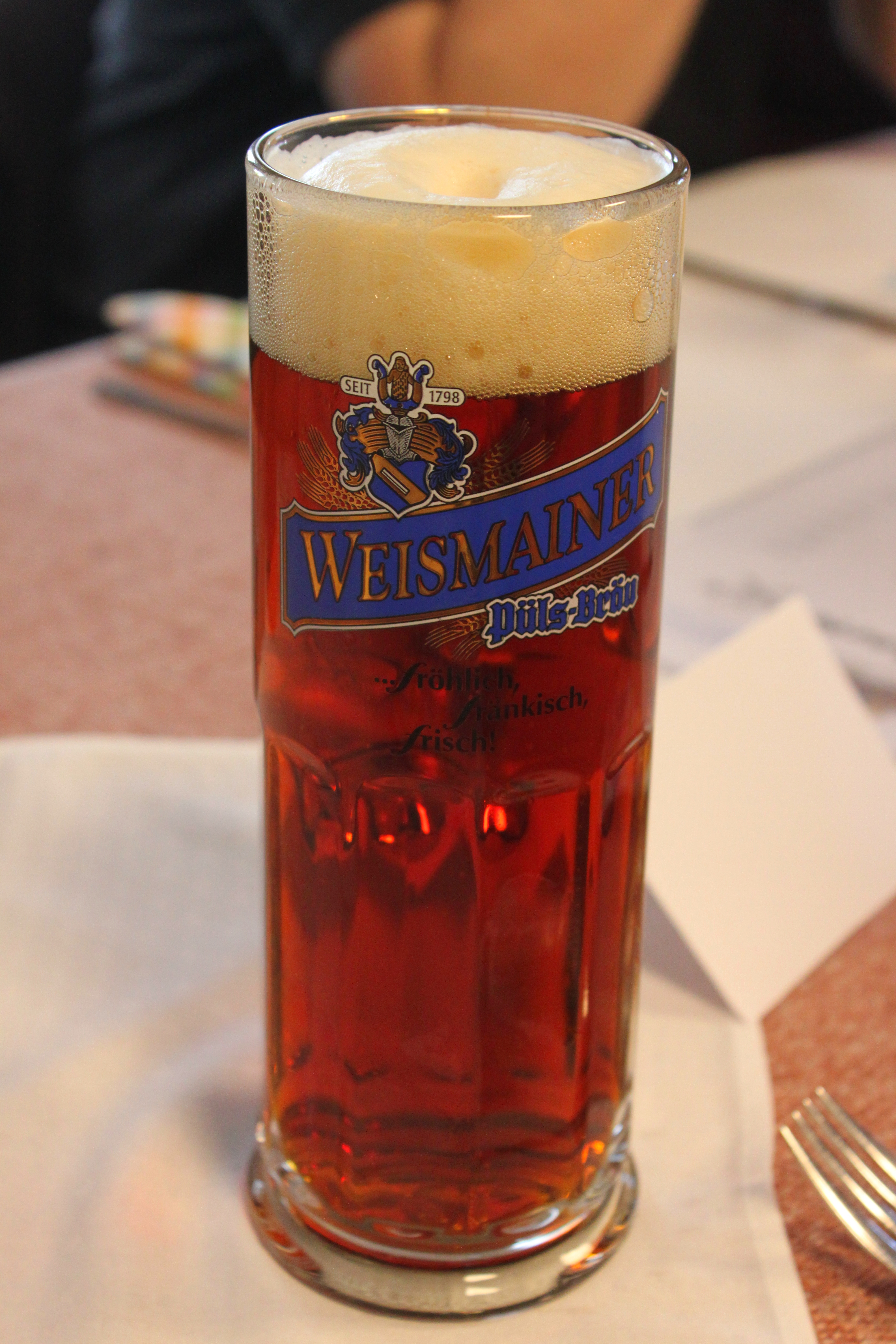 Altfränkischer Kellertrunk der Brauerei Püls-Bräu aus Weismain.